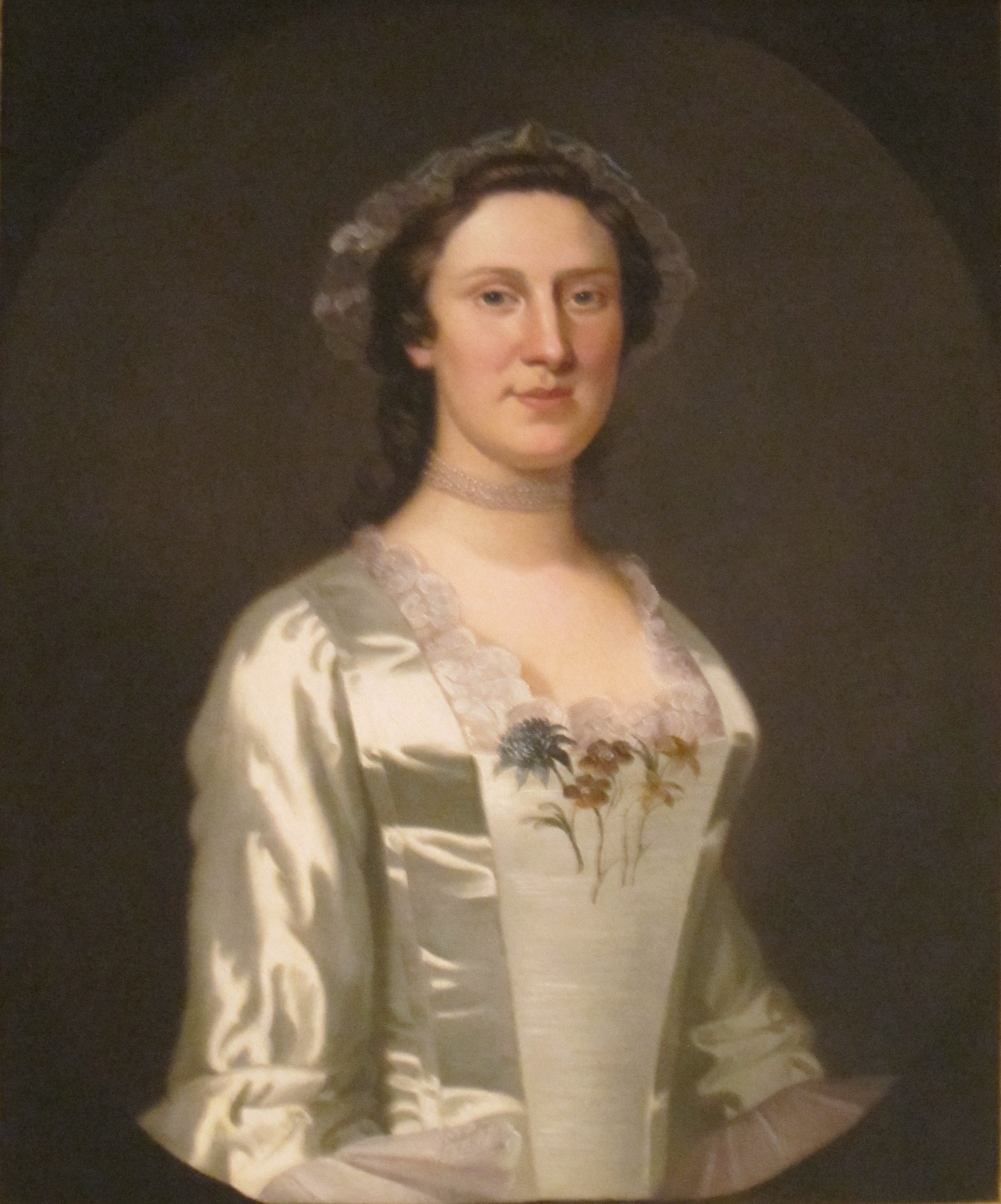 Mrs. Philip de Visme (Anna Proro Stillwell)